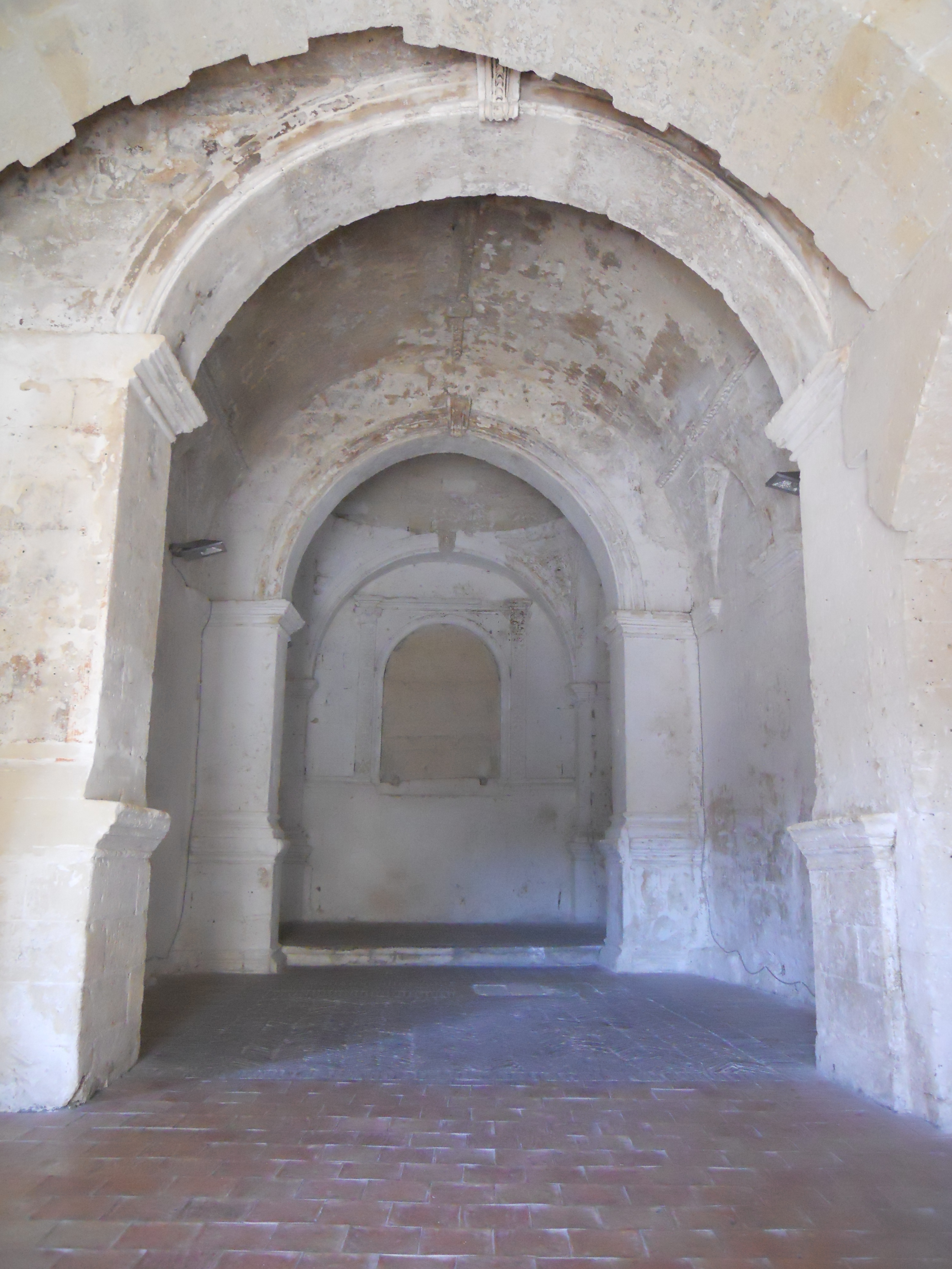 Chiesa Santa Maria De'Armeniis This is a photo of a monument which is part of cultural heritage of Italy.